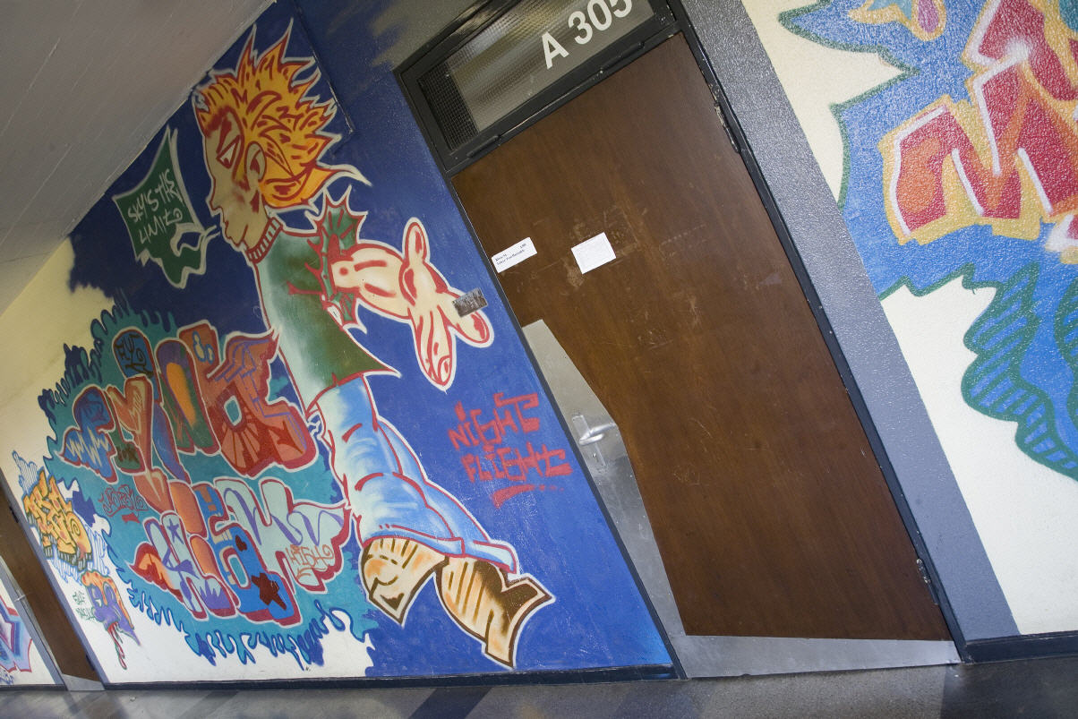 Wandmalerei (Graffiti) in der oberen Etage des Altbaus im Gymnasium Kreuzgasse